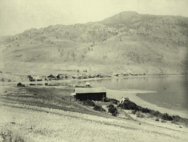 Savona British Columbia, circa 1885.